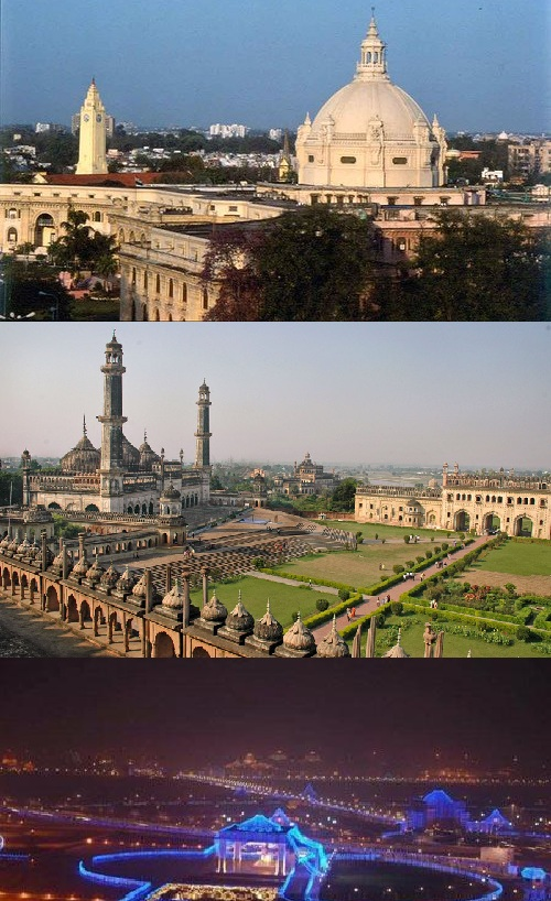 लखनऊ शहर की कुछ खास तस्वीरें